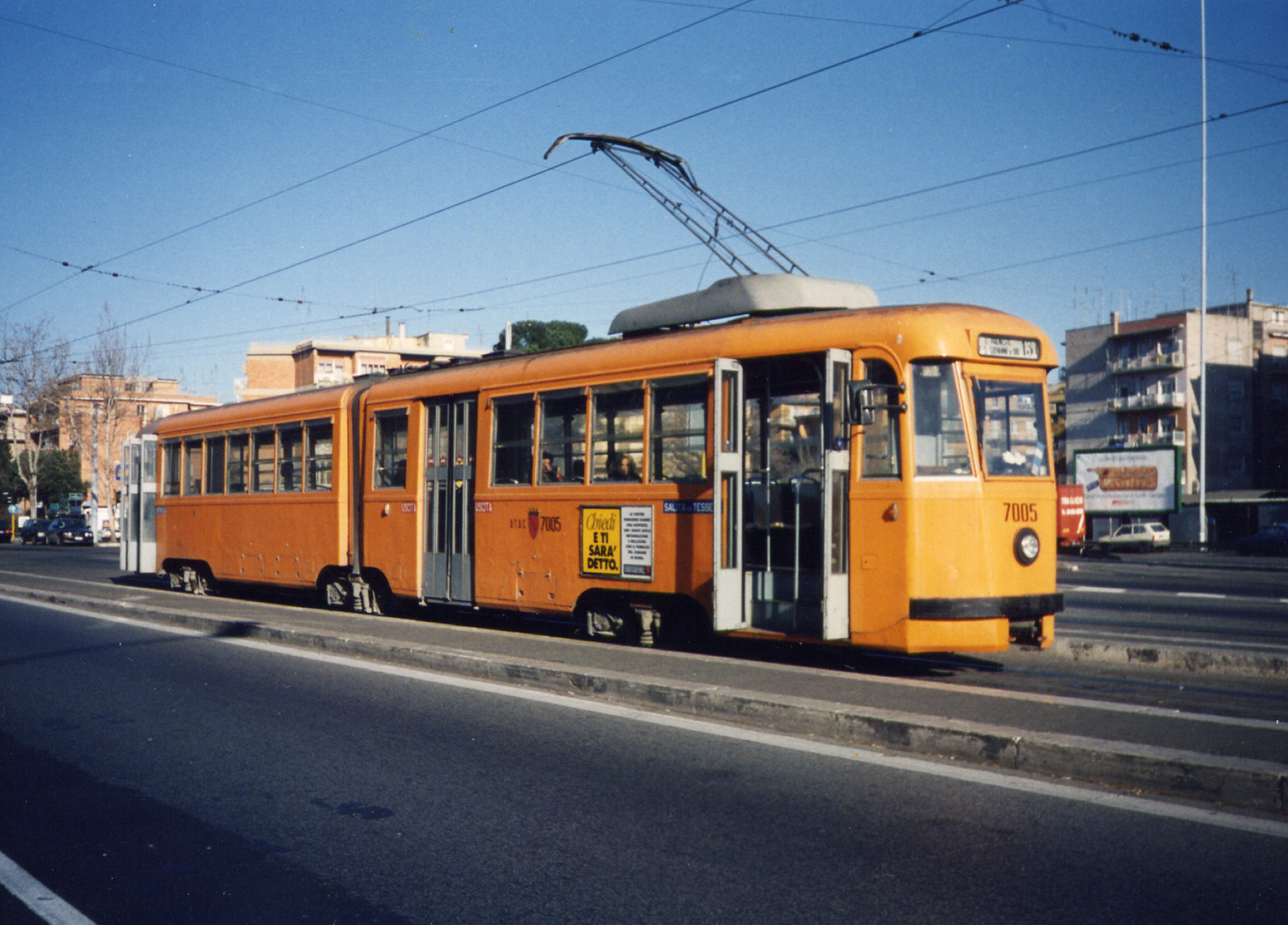 Vettura tranviaria 7005 dell'ATAC di Roma